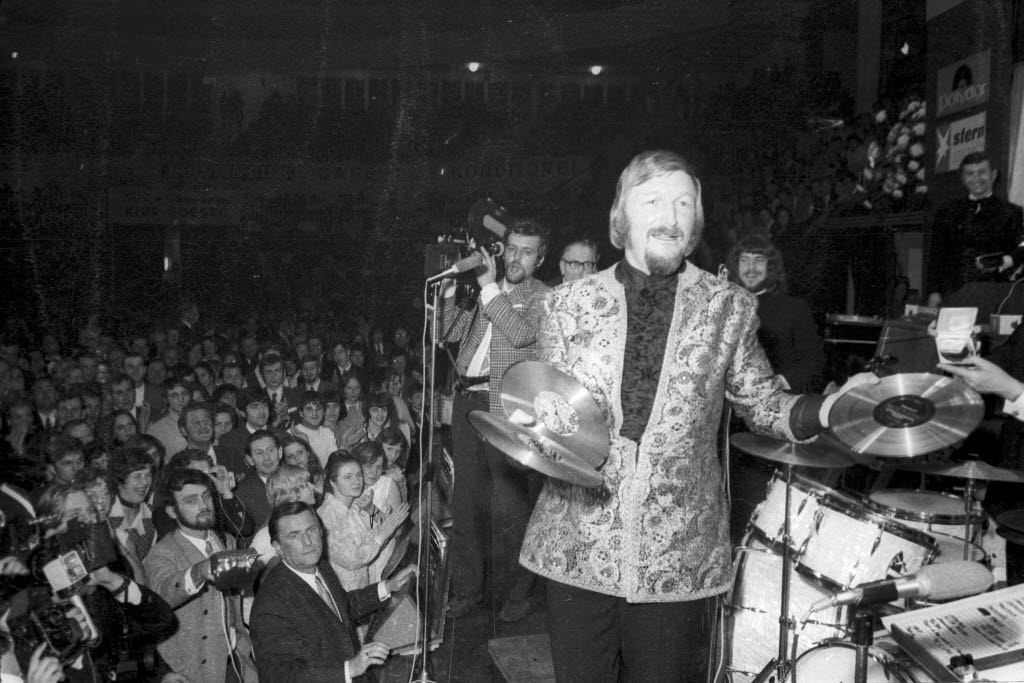 Last präsentiert die drei Goldenen Schallplatten, die ihm an diesem Abend für seine Plattenerfolge von Bundesfinanzminister Dr. Alex Möller überreicht wurden.